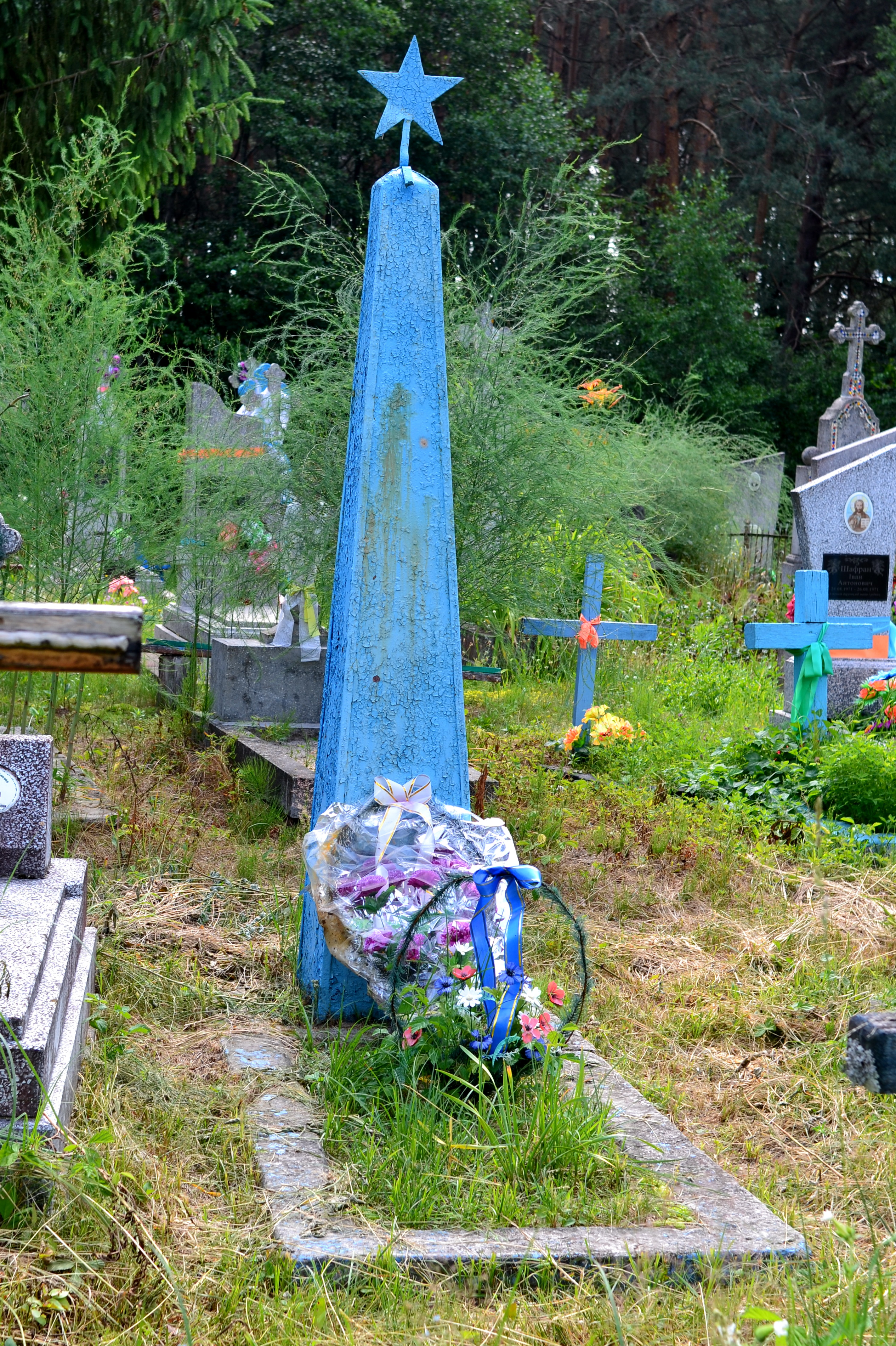 Могила радянського стрільця-радиста (1984 рік) - Ладинь (на кладовищі) Любомльський район Волинська область Україна